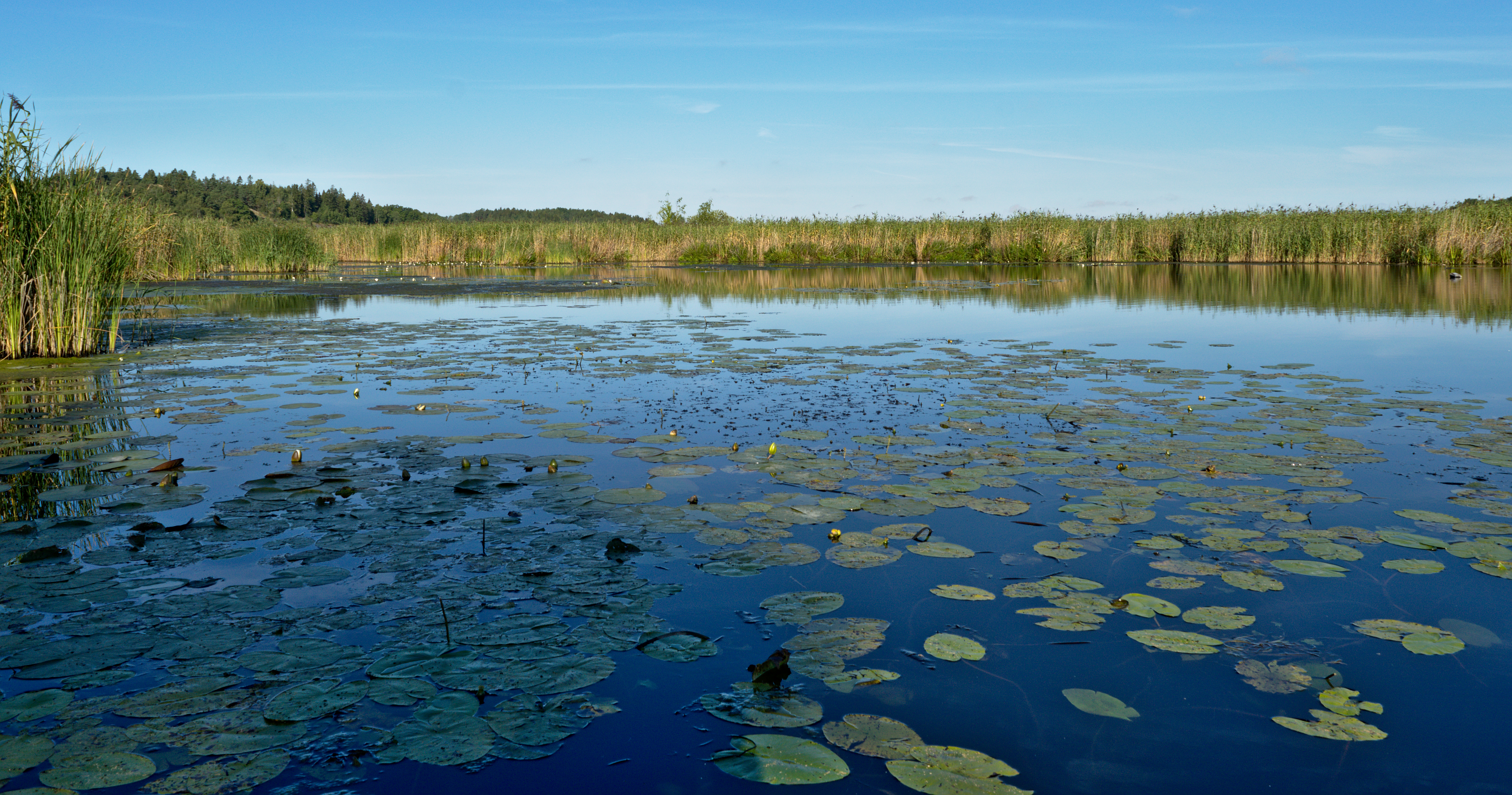 Sjön Barva-Lappen i Eskilstuna kommun. Sett från östra sidan.